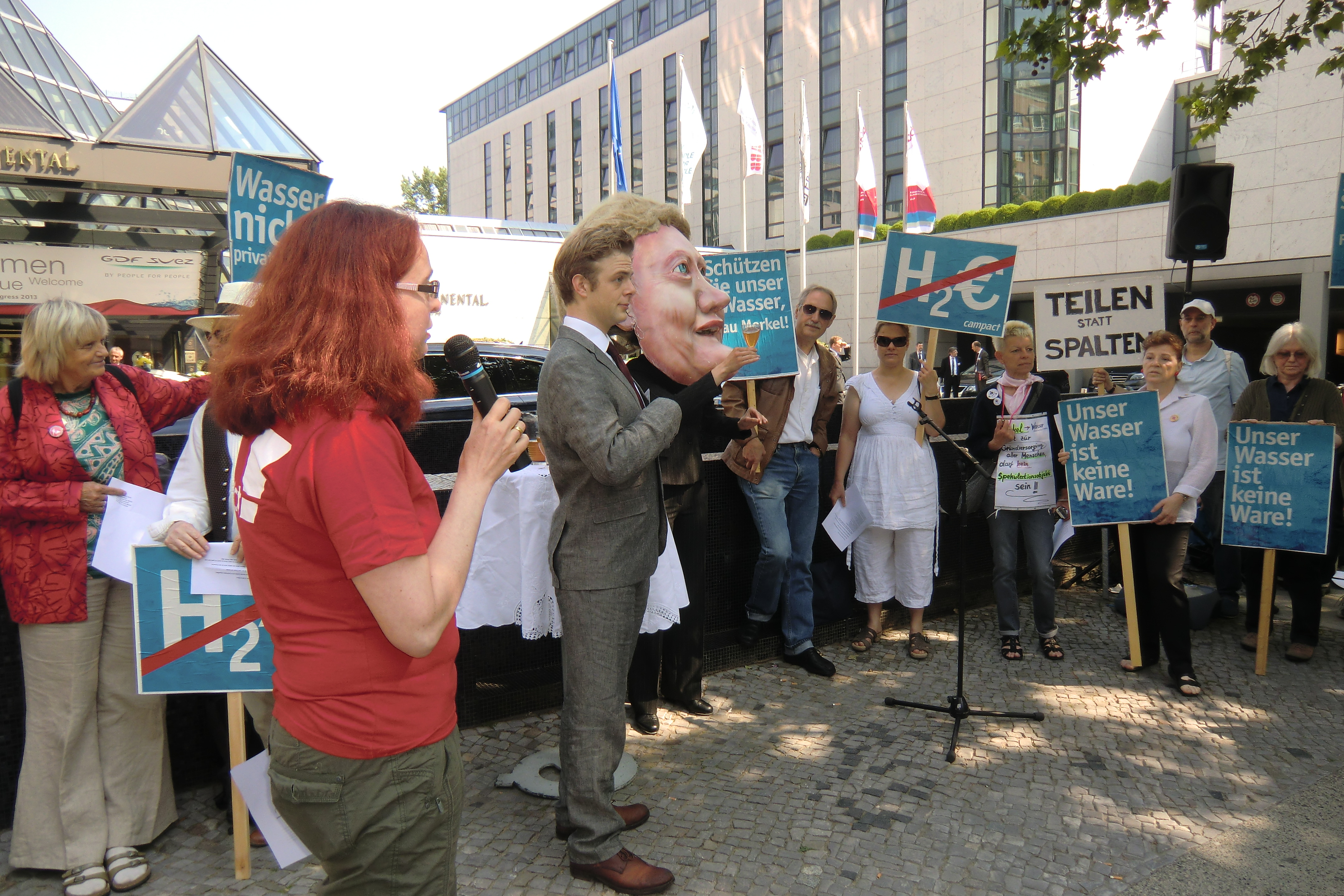 Aktion von Campact vor dem Hotel Interkontinental in Berlin gegen die Privatisierung von Wasser.